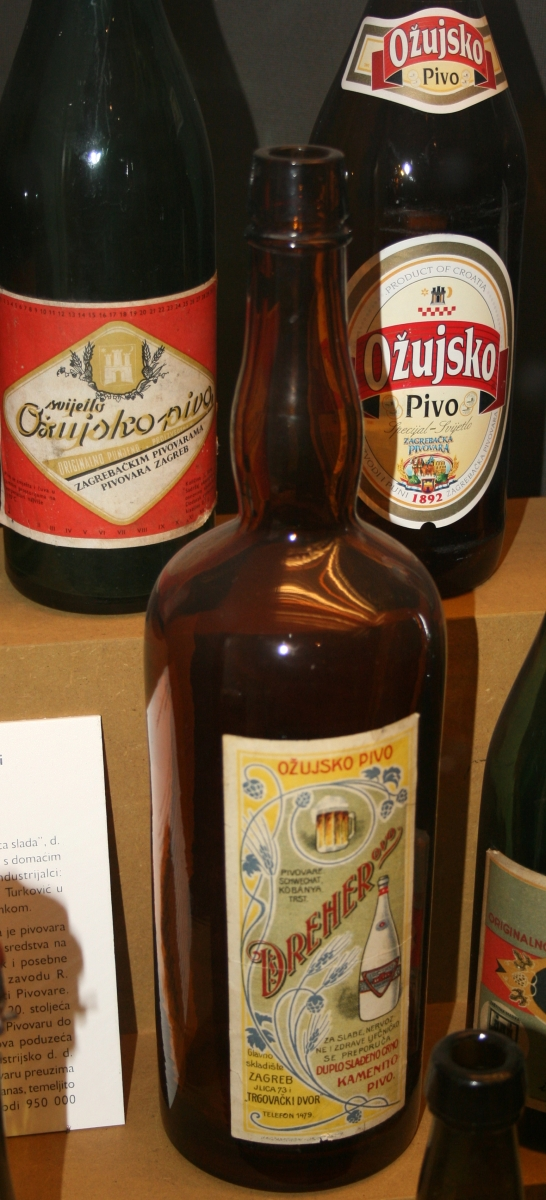 Boca Ožujskog piva u Muzeju grada Zagreba